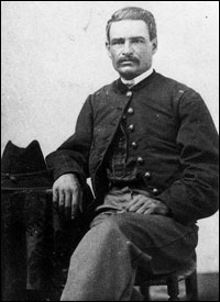 First Lieutenant Stephen Atkins Swails, United States Volunteers